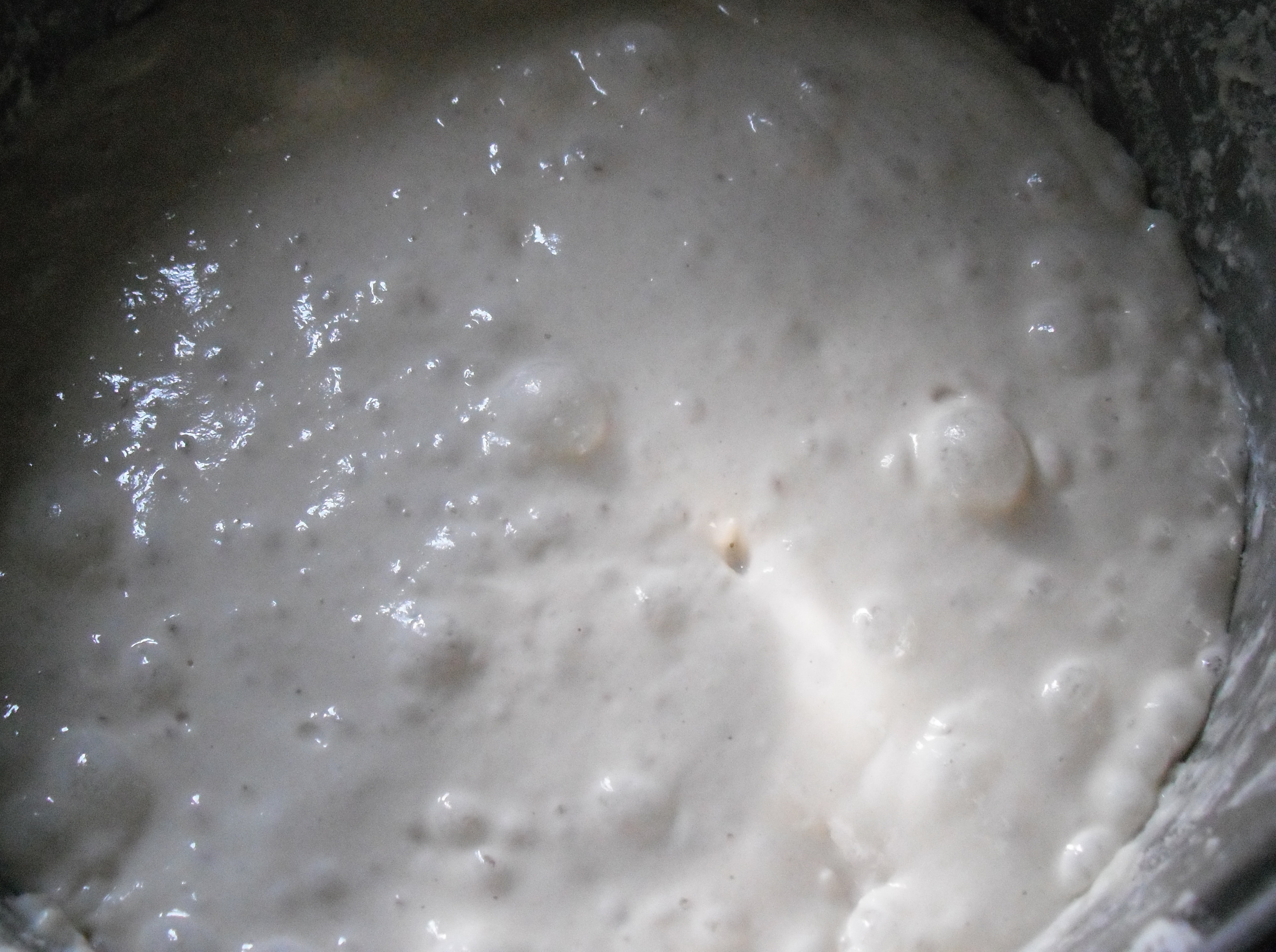 Poolish con lievito madre